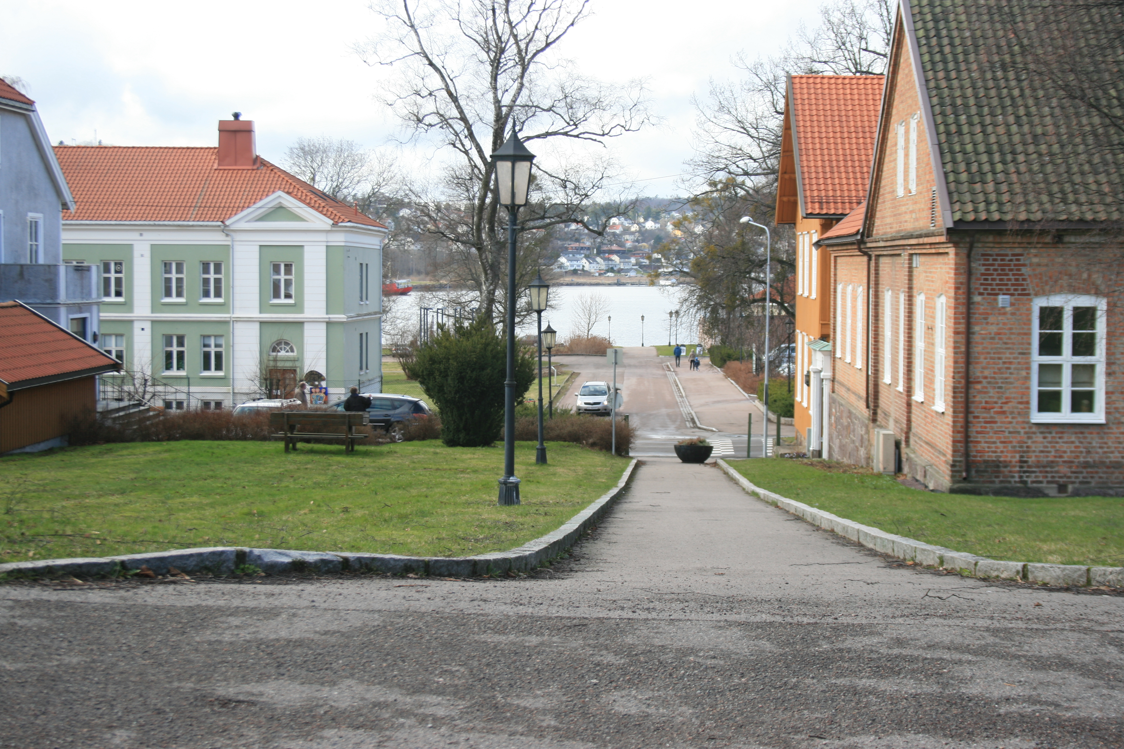 Kommandørkaptein Klinkcs vei, sett fra Øvre vei.